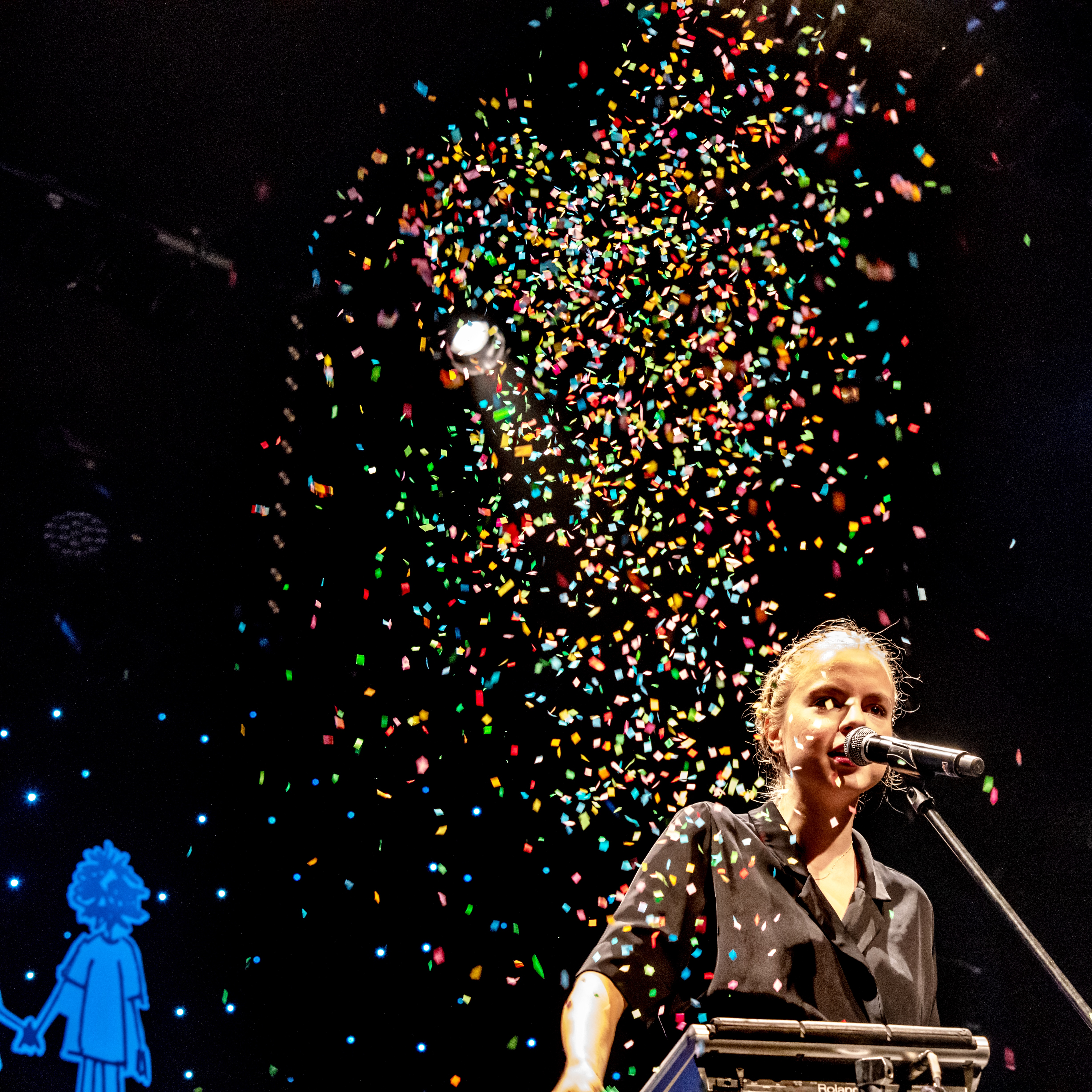 Bilder vom Zelt Musik Festival 2018 in Freiburg im Breisgau Auftritt Julia Engelmann am 25. Juli 2018 im Zirkuszelt